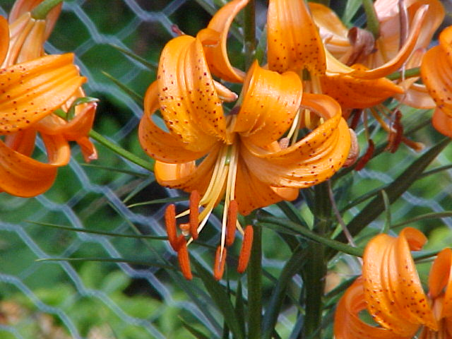 Lilium davidii var. wilmottiae